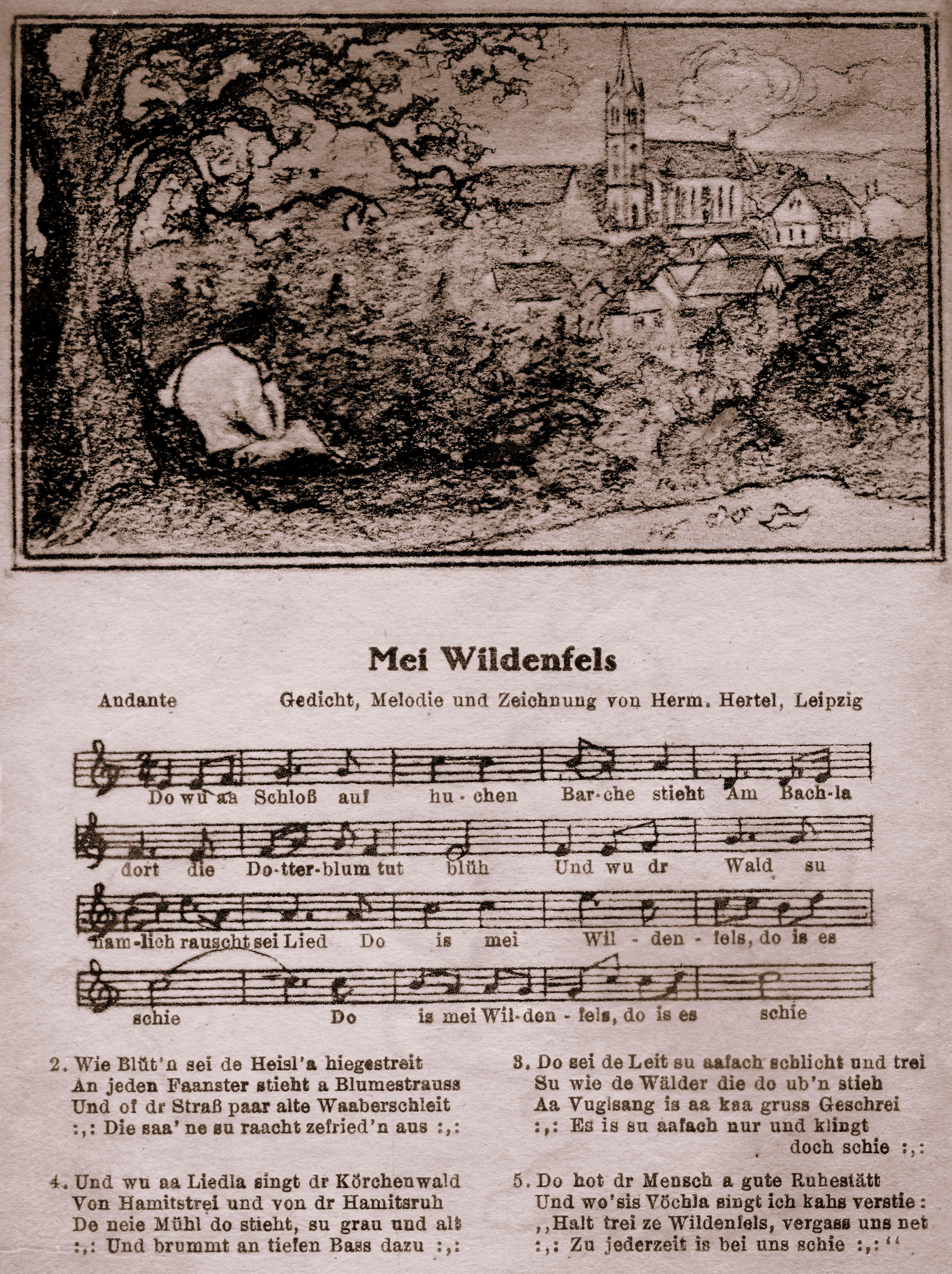 Das Wildenfelser Heimatlied. Abbildung des Originals, das ursprünglich im ehemaligen Heimatmuseum Wildenfels ausgestellt war.